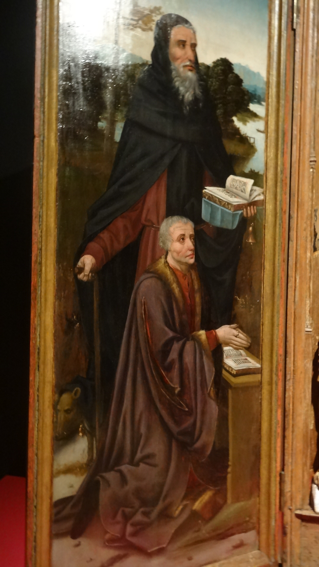 Painel esquerdo do Retábulo dos Reis Magos, estando representado o doador Francisco Homem de Gouveia sob a proteção de S. Antão Abade, cerca de 1520, de Oficina de Antuérpia na Capela dos Reis Magos, no Estreito da Calheta, na Ilha da Madeira